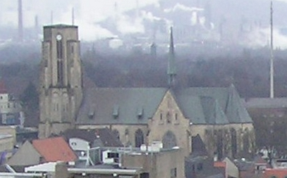 Gelsenkirchen-Buer, Kath. Propsteikirche St. Urbanus